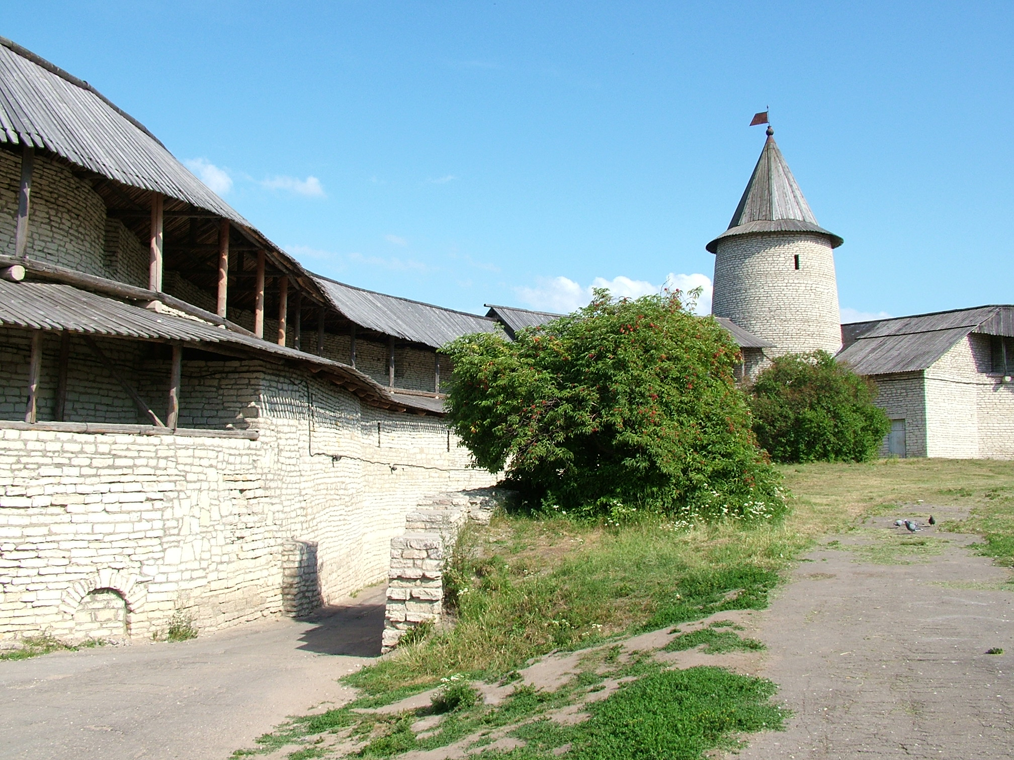 Kremlin in Pskov, Russia.